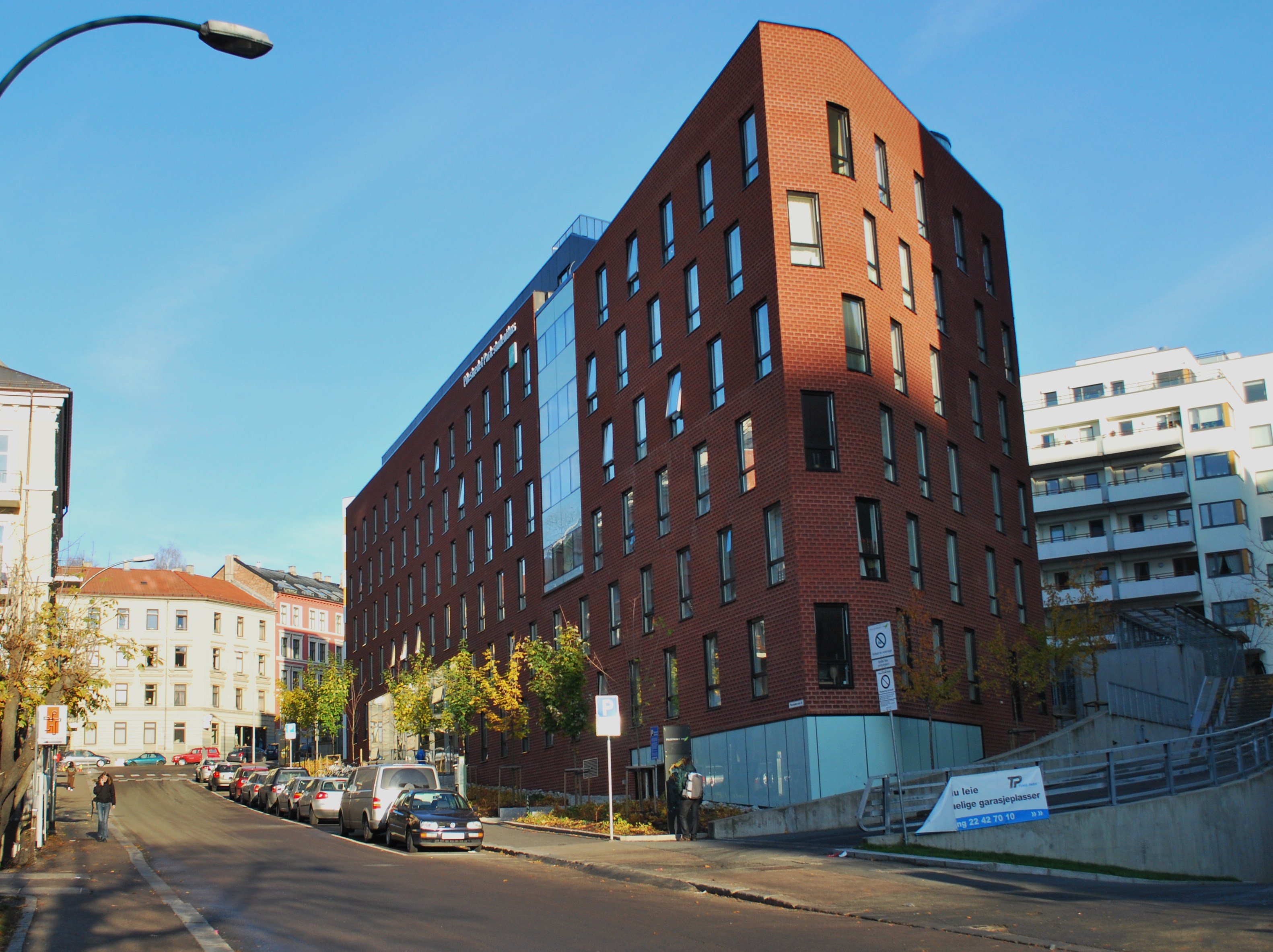 Pilestredet park, Oslo. Studentboligene langs Holbergs gate